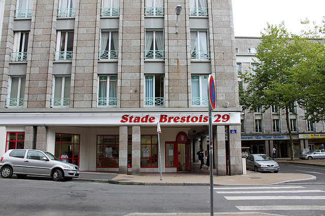 Boutique du Stade Brestois 29, place de la Liberté, centre ville de Brest